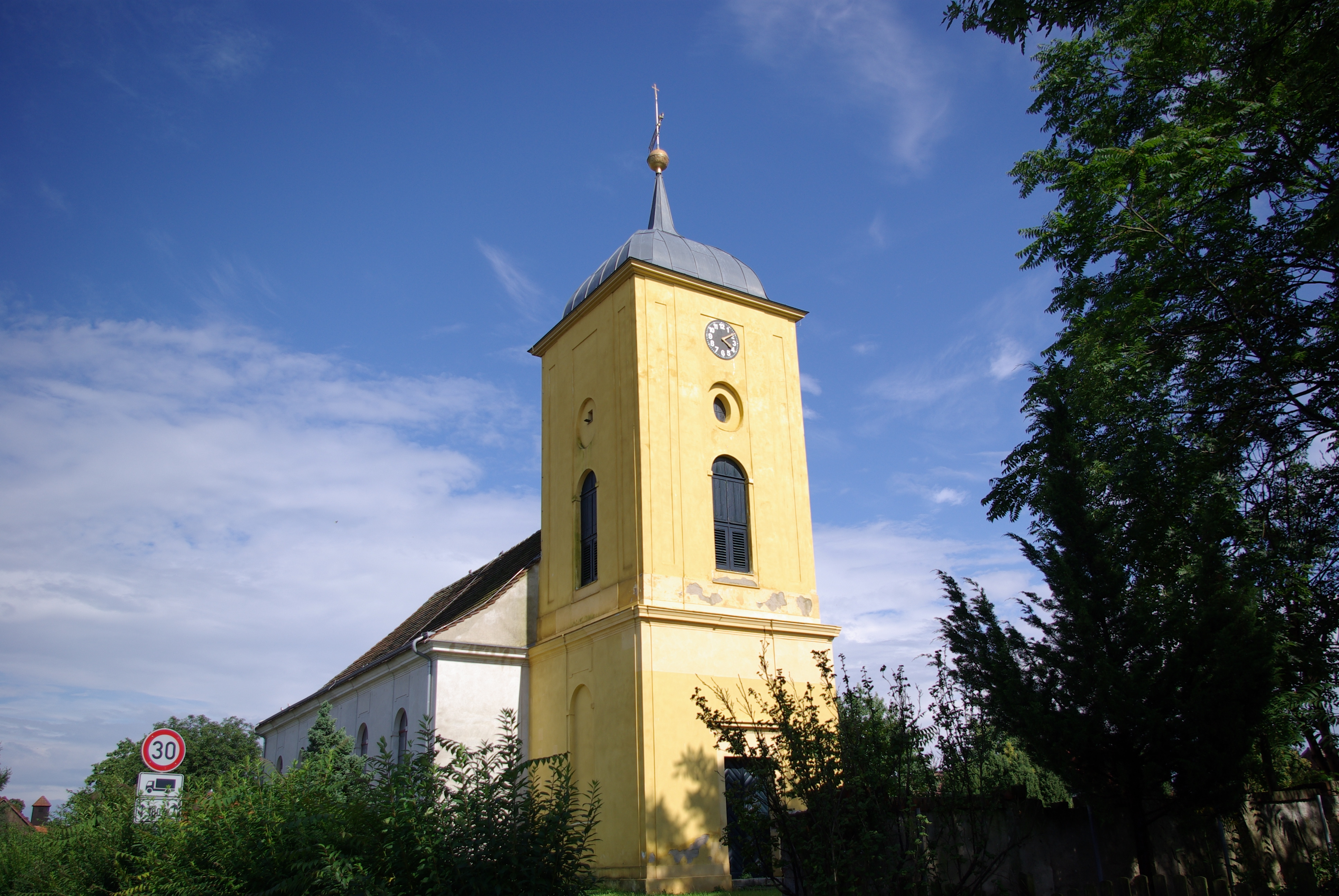 Mühlenberge in Brandenburg. Die Kirche im Ortsteil Wagenitzu steht unter Denkmalschutz.